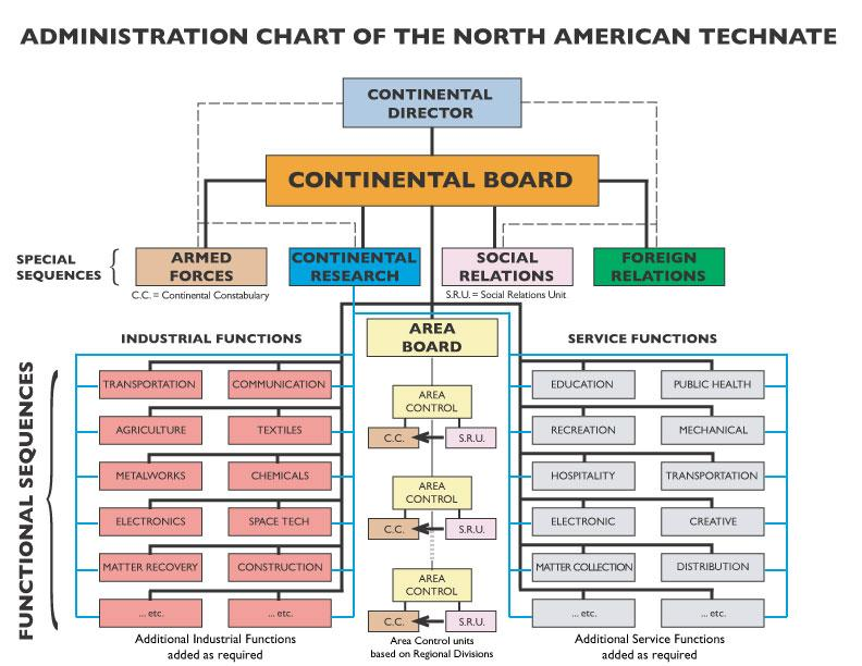 Organisation état selon Technocracy Inc.